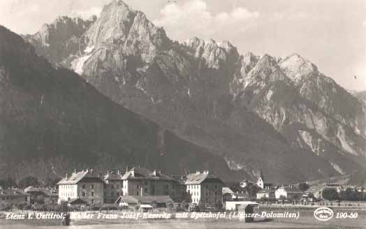 Kaiser Franz-Josef Kaserne in Lienz